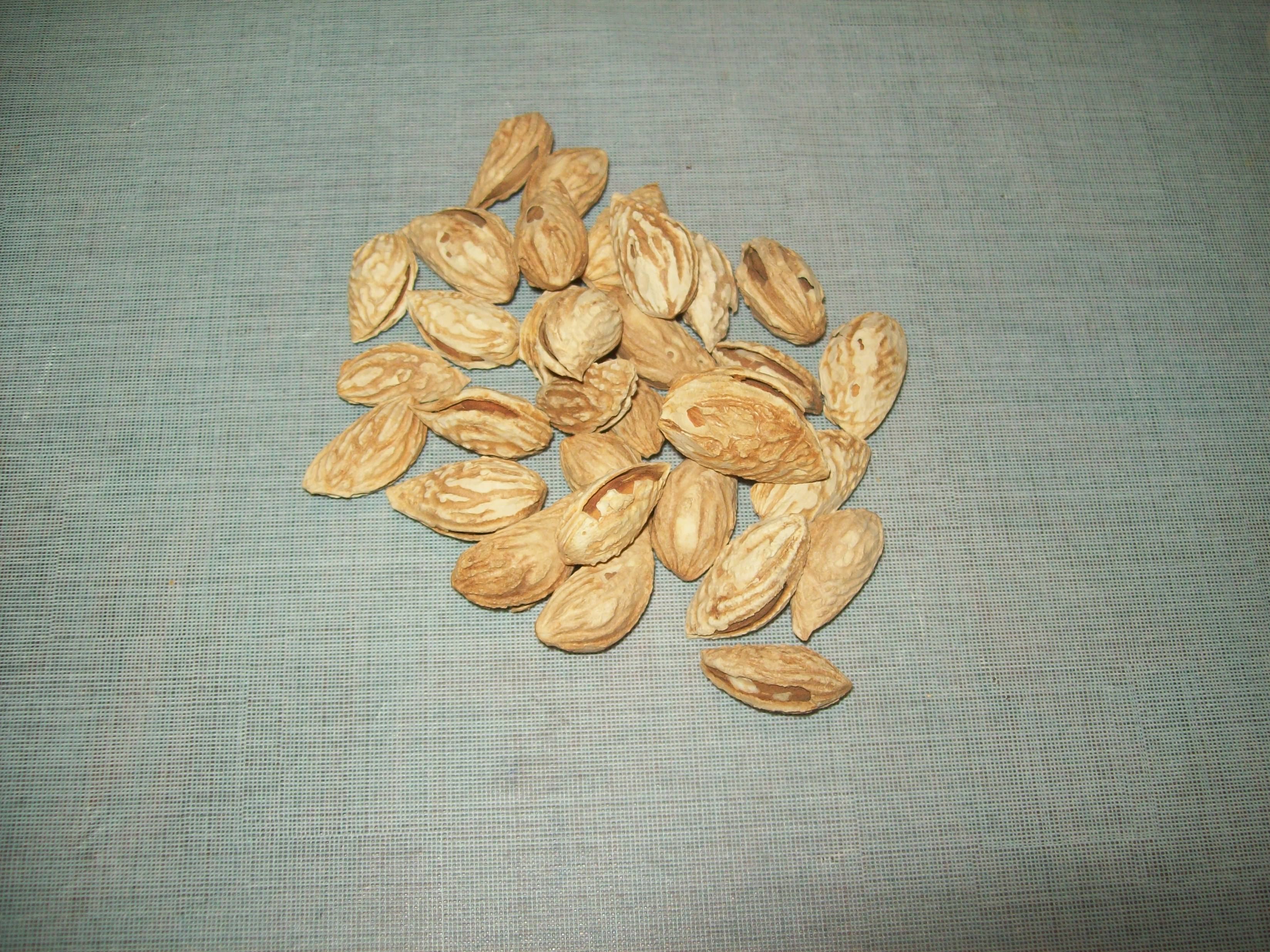 Сорт Бумажноскорлупый - является своем рода непревзойденным так как его ядро можно извлекать не используя спец. приспособлении только одной рукой. То есть скорлупа очень тонко.